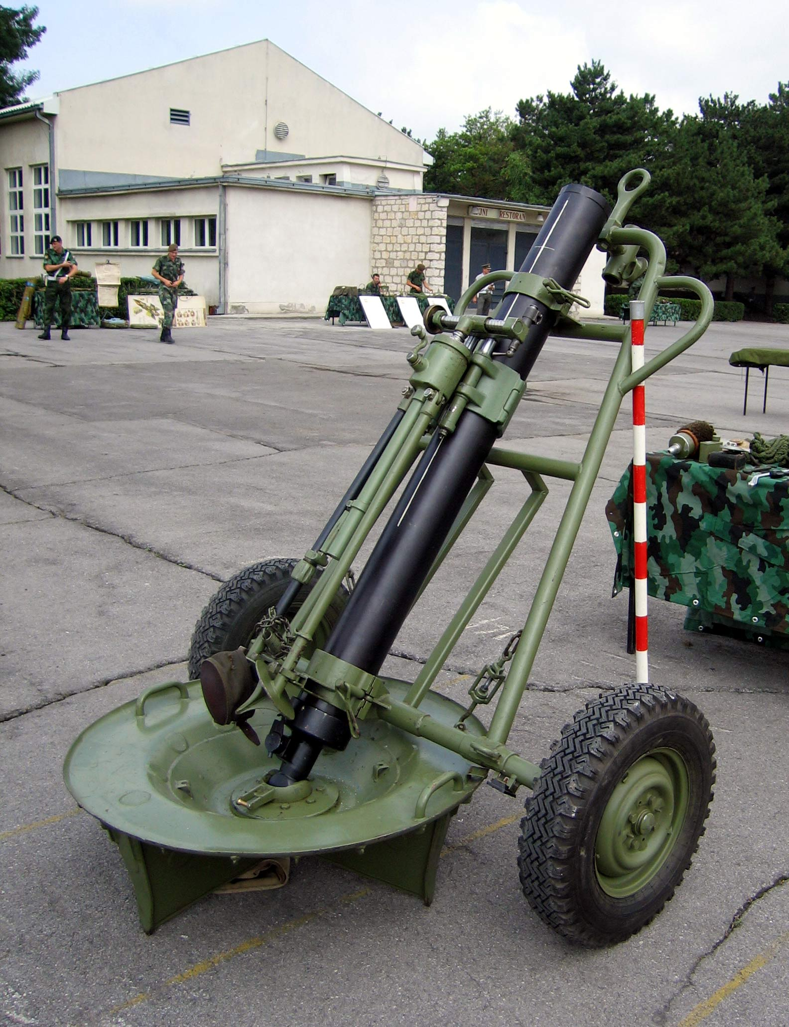 Минобацач М95 120мм, маршевни положај.